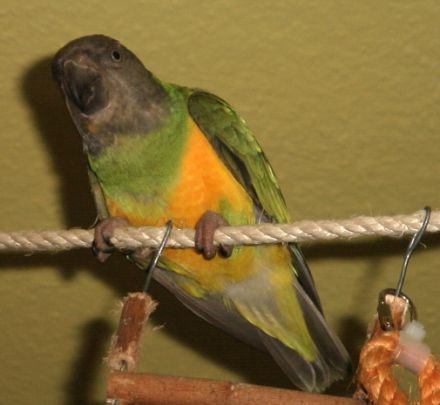 Mohrenkopfpapagei (Poicephalus senegalus).